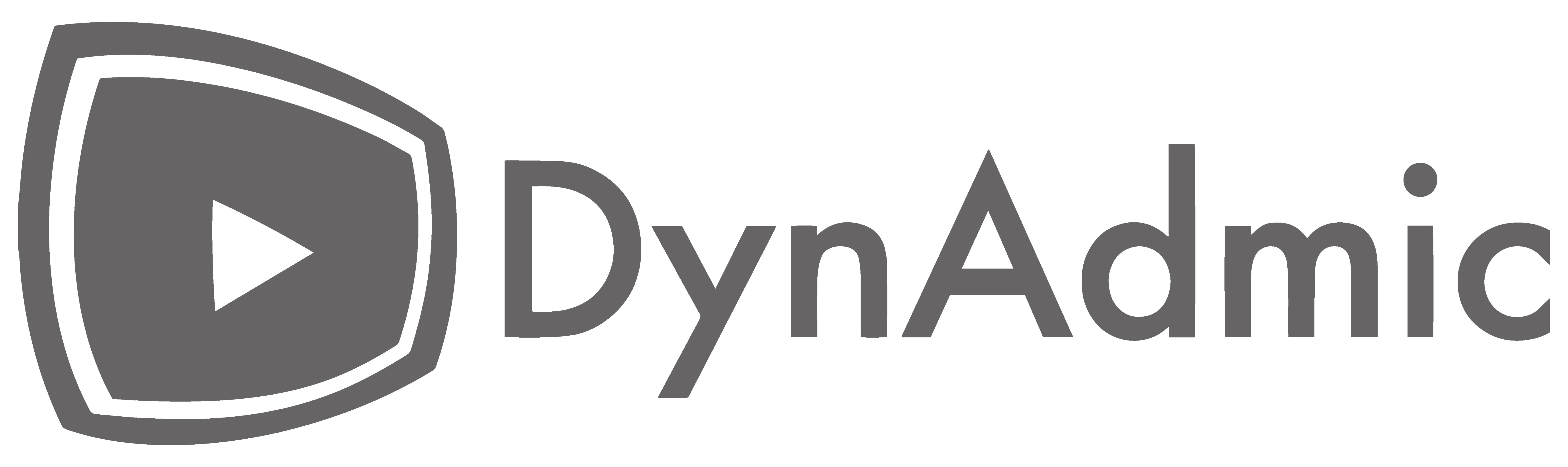 DynAdmic Logo